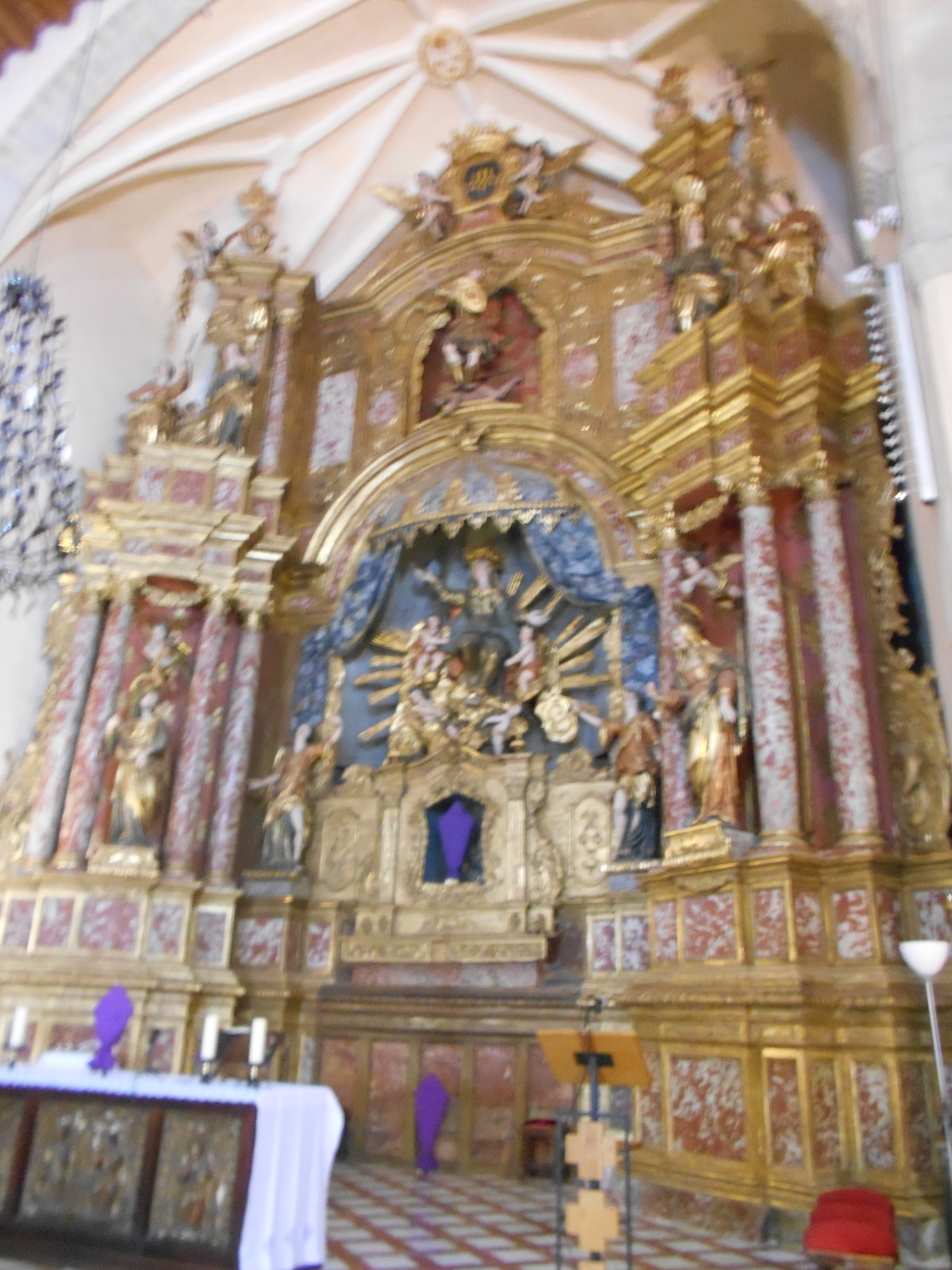 Retaule de l'altar major de l'església parroquial de Santa Maria del Prat, d'Argelers de la Marenda